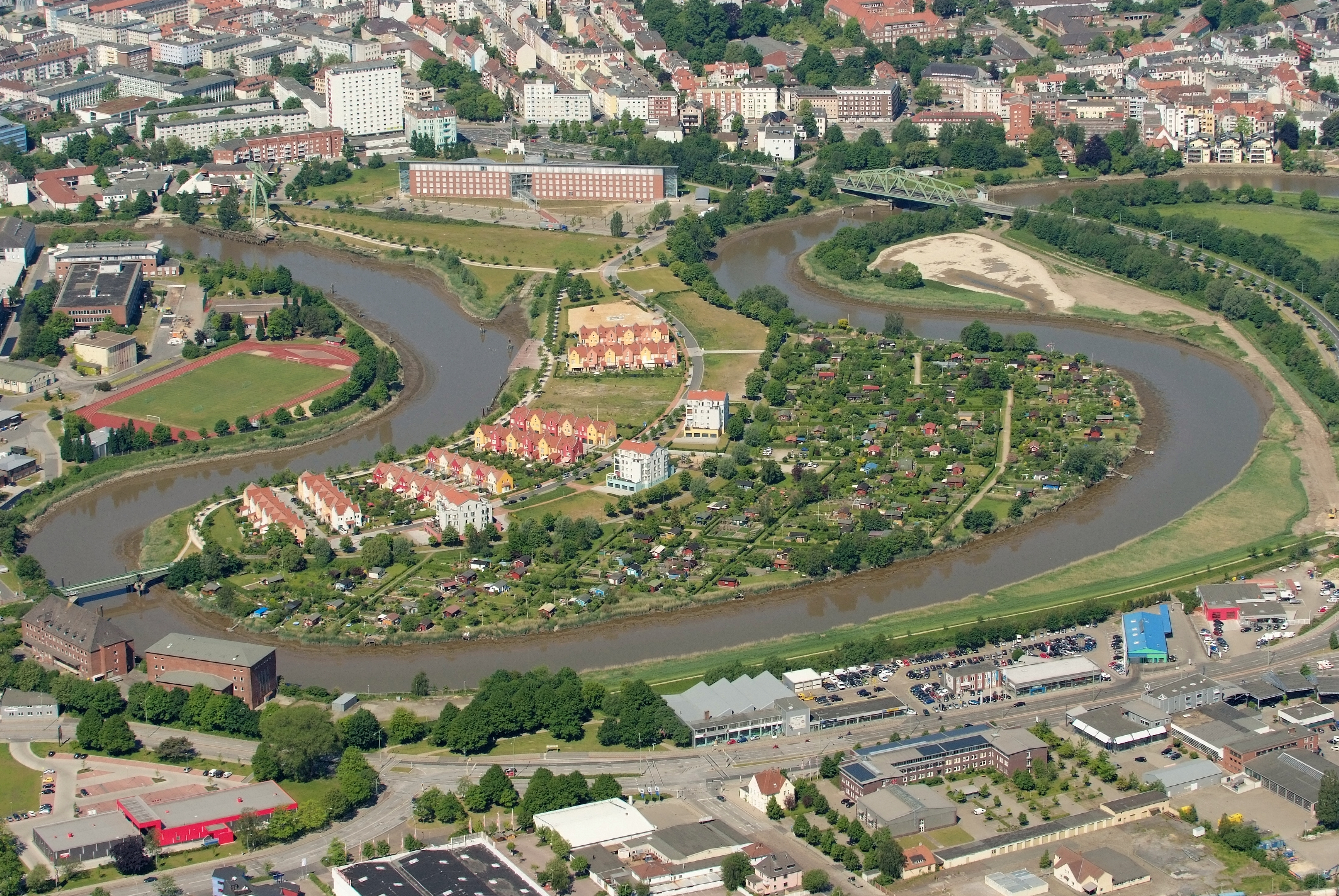 Geestebogen in Bremerhaven Fotoflug vom Flugplatz Nordholz-Spieka über Cuxhaven und Wilhelmshaven